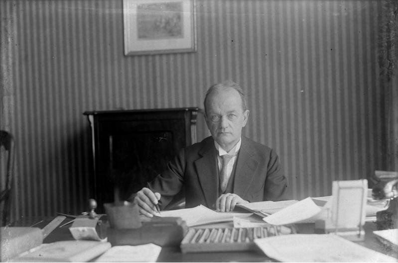 Interessante Aufnahmen aus dem Deutschen Reichsarchiv in Potsdam, wo die bedeutendsten Dokumente und Verträge des Reiches in sicherer Obhut aufbewahrt und verwaltet werden. Aus dem Deutschen Reichsarchiv in Potsdam! Der Präsident des Reichsarchivs in Potsdam Dr. h.c. Ritter Mertz von Quirnheim.